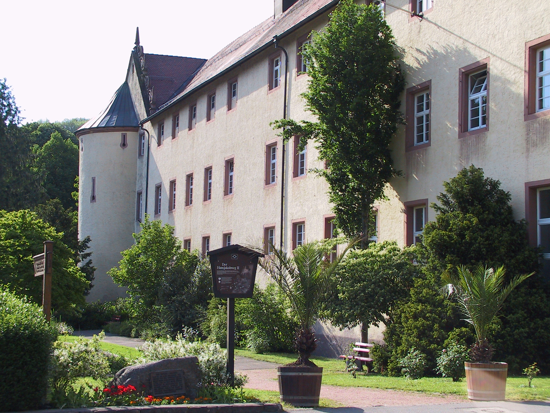 Der Westflügel des fürstlich-fürstenbergischen Schlosses in Wolfach